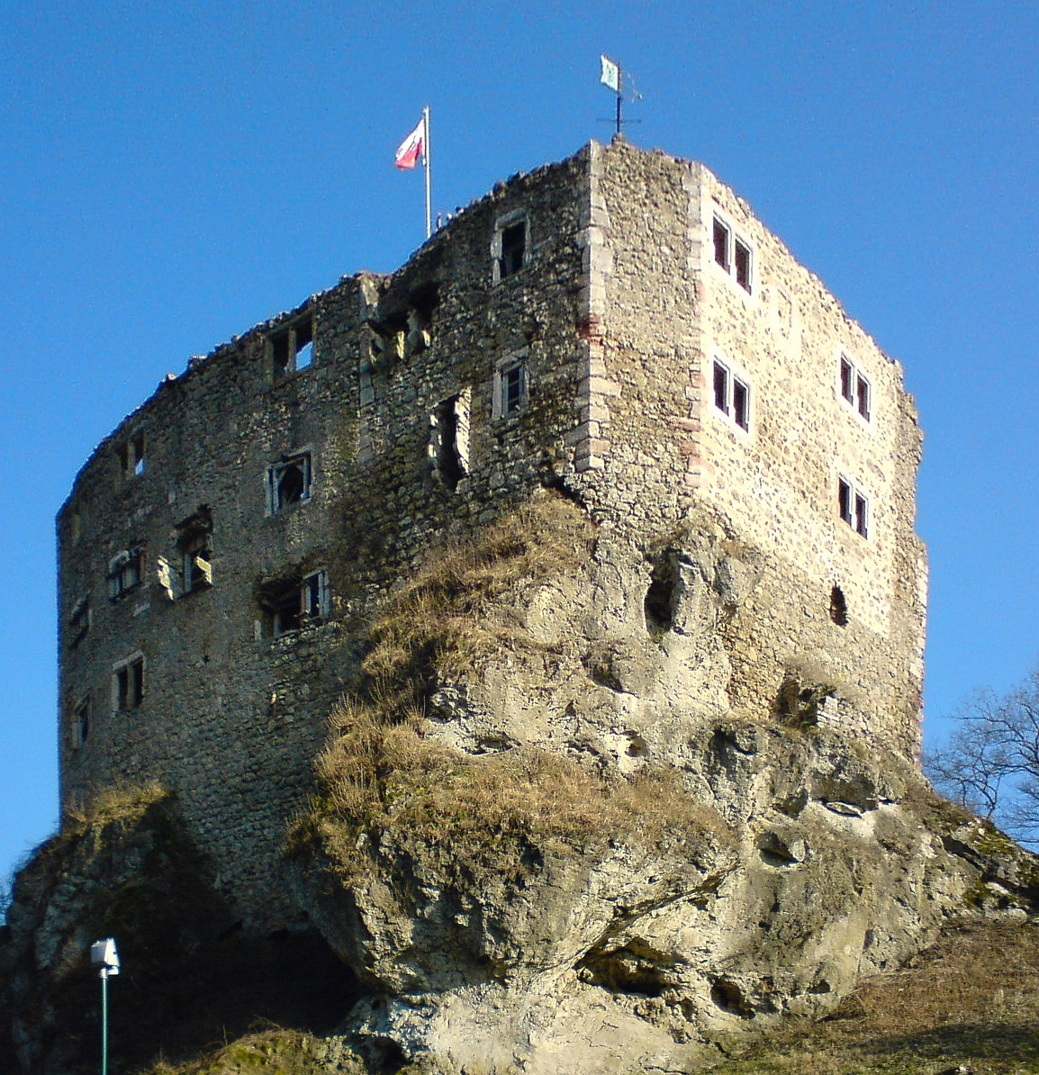 Burgruine Liebenstein bei Bad Liebenstein (Blick aus nordwestlicher Richtung)